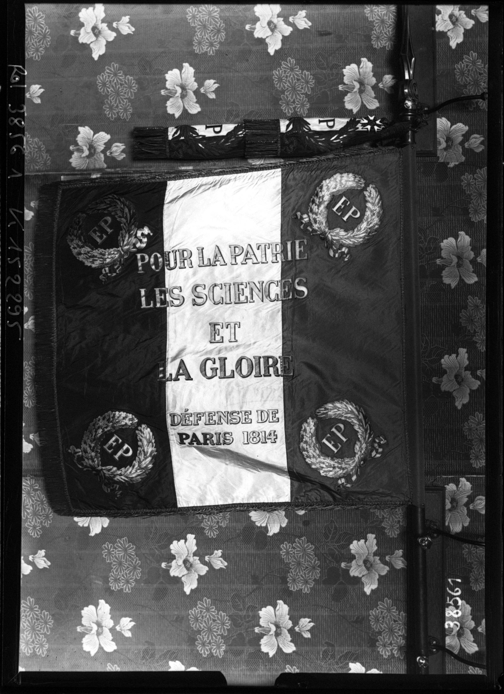 Envers du drapeau de l'École polytechnique. 1 photogr. nég. sur verre ; 13 x 18 cm (sup.)